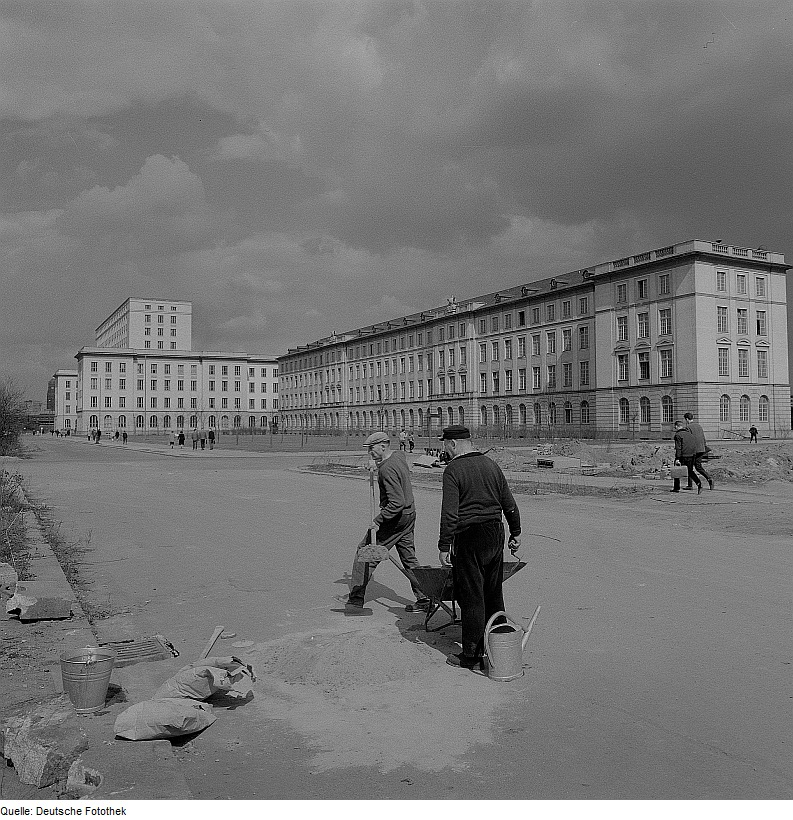 Original image description from the Deutsche FotothekDresden. Hochschule für Verkehrswesen „Friedrich List“